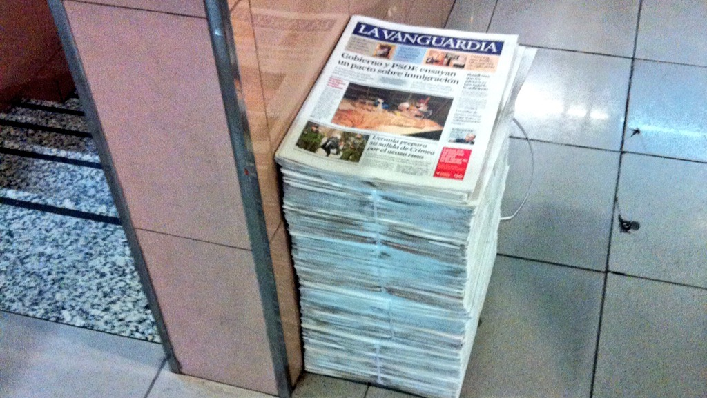 La Vanguardia Gratis al Tren